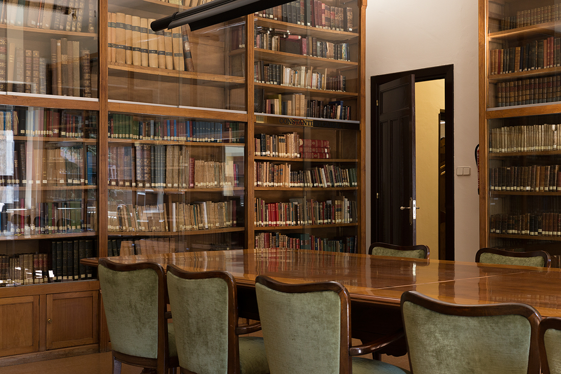 Sala de lectura